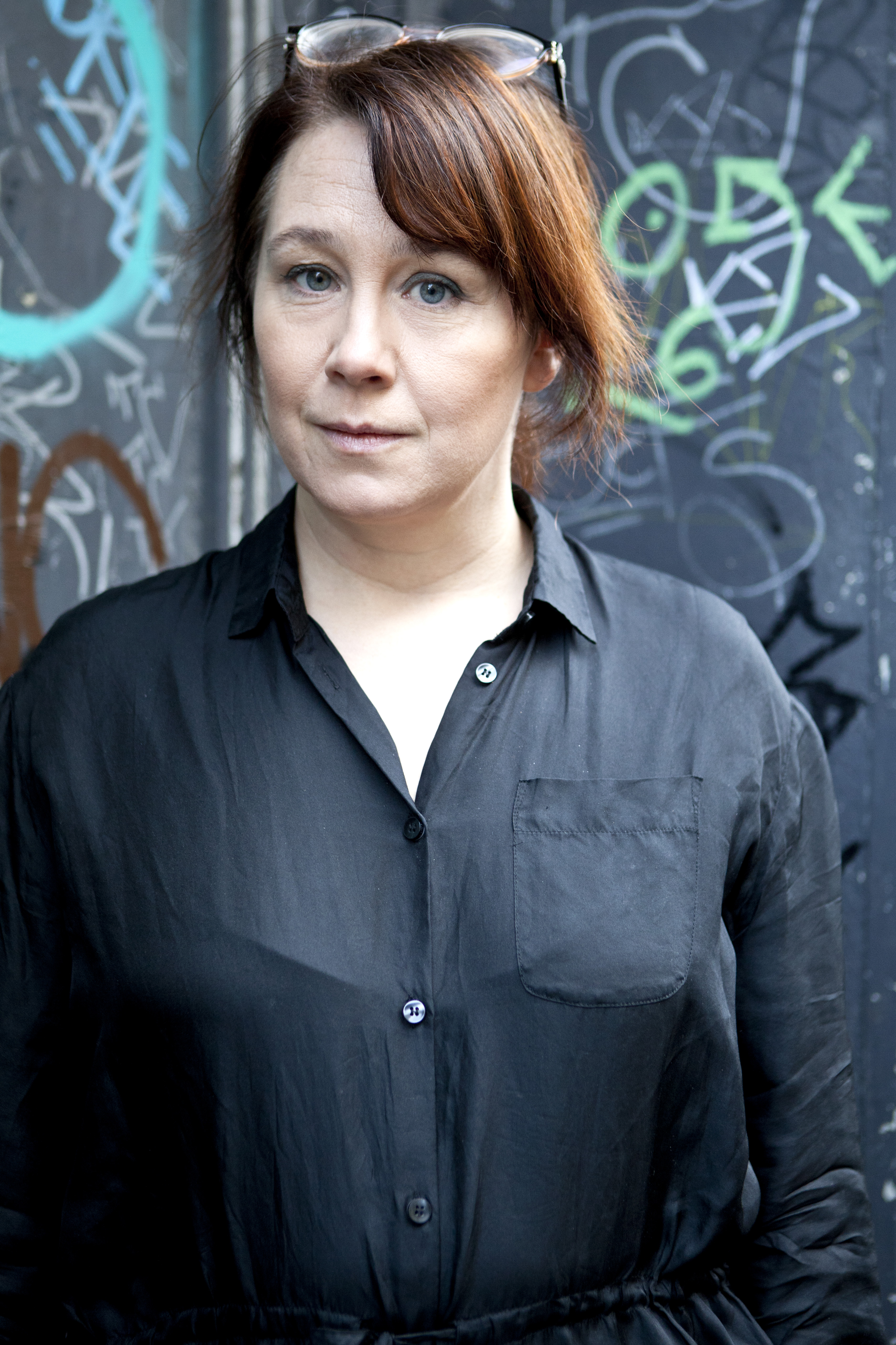 Den konstnärlig ledaren på Folkteatern i Göteborg, Frida Röhl.